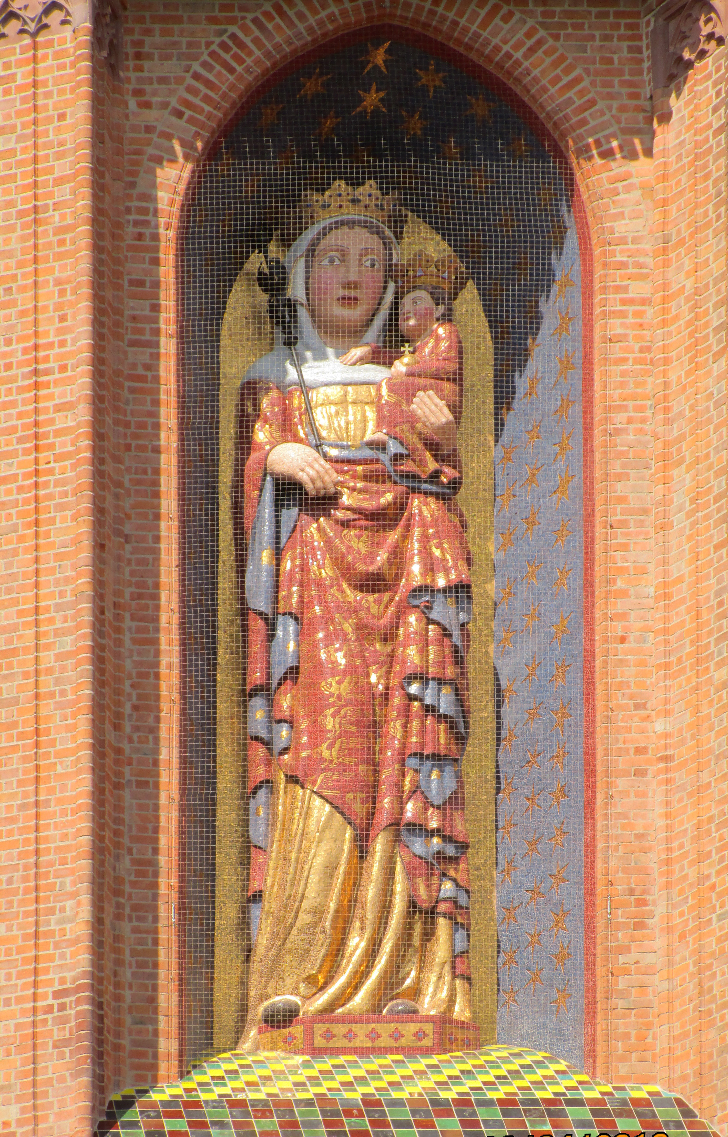 Marienfigur in der Außennische der Kirche der Marienburg